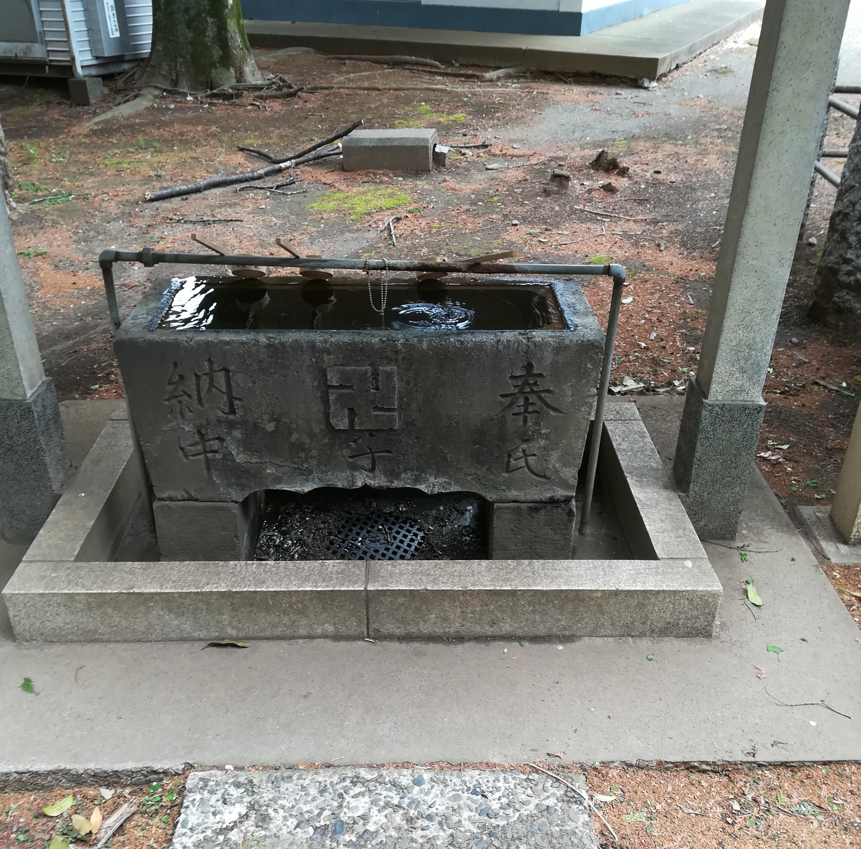 中村八幡神社手水舎。東京都練馬区中村南。文政13年(1830年)11月吉日の陰刻がある水盤は練馬区指定有形文化財。